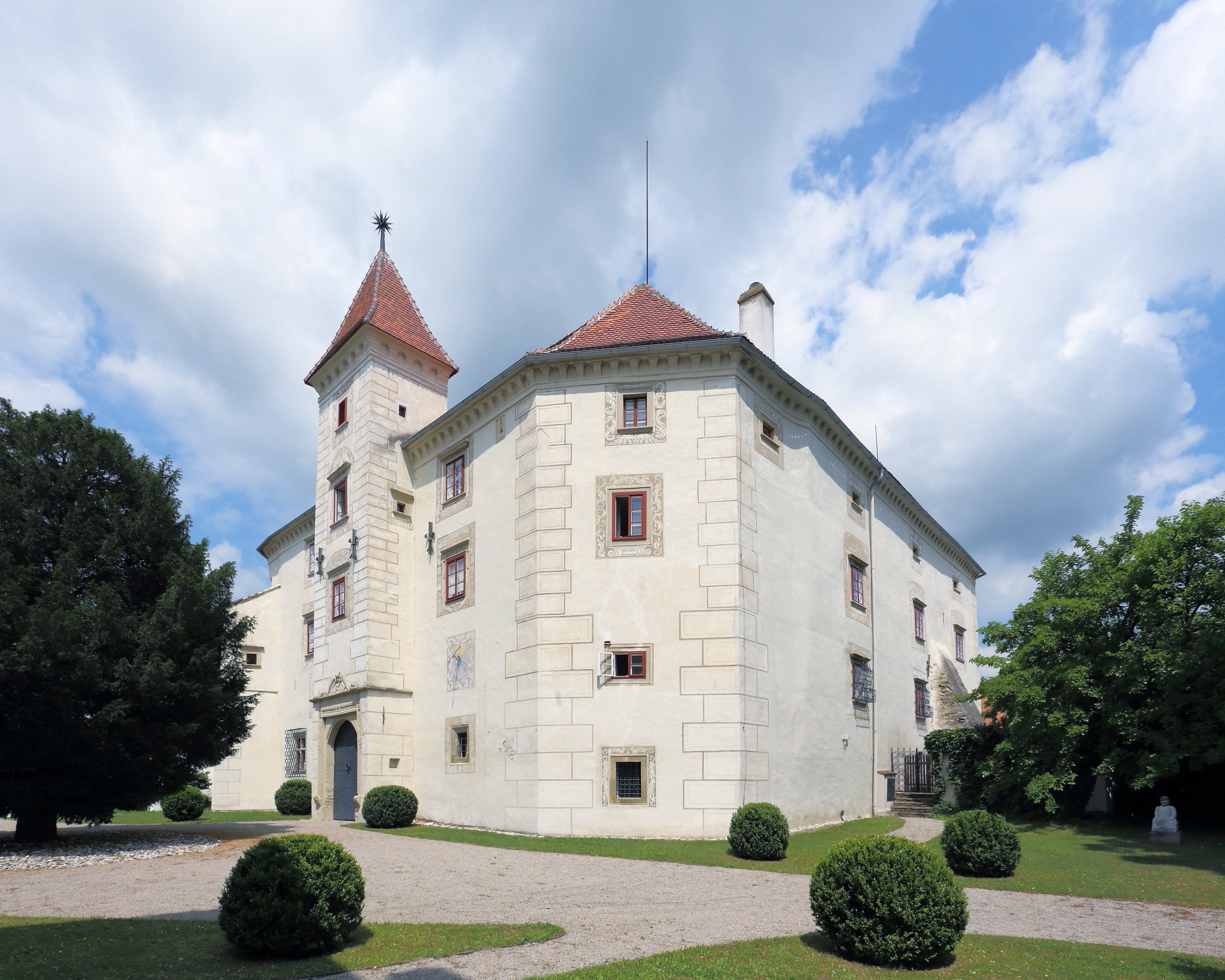 Südostansicht des Breiteneicher Renaissanceschlosses in der niederösterreichischen Bezirkshauptstadt Horn.